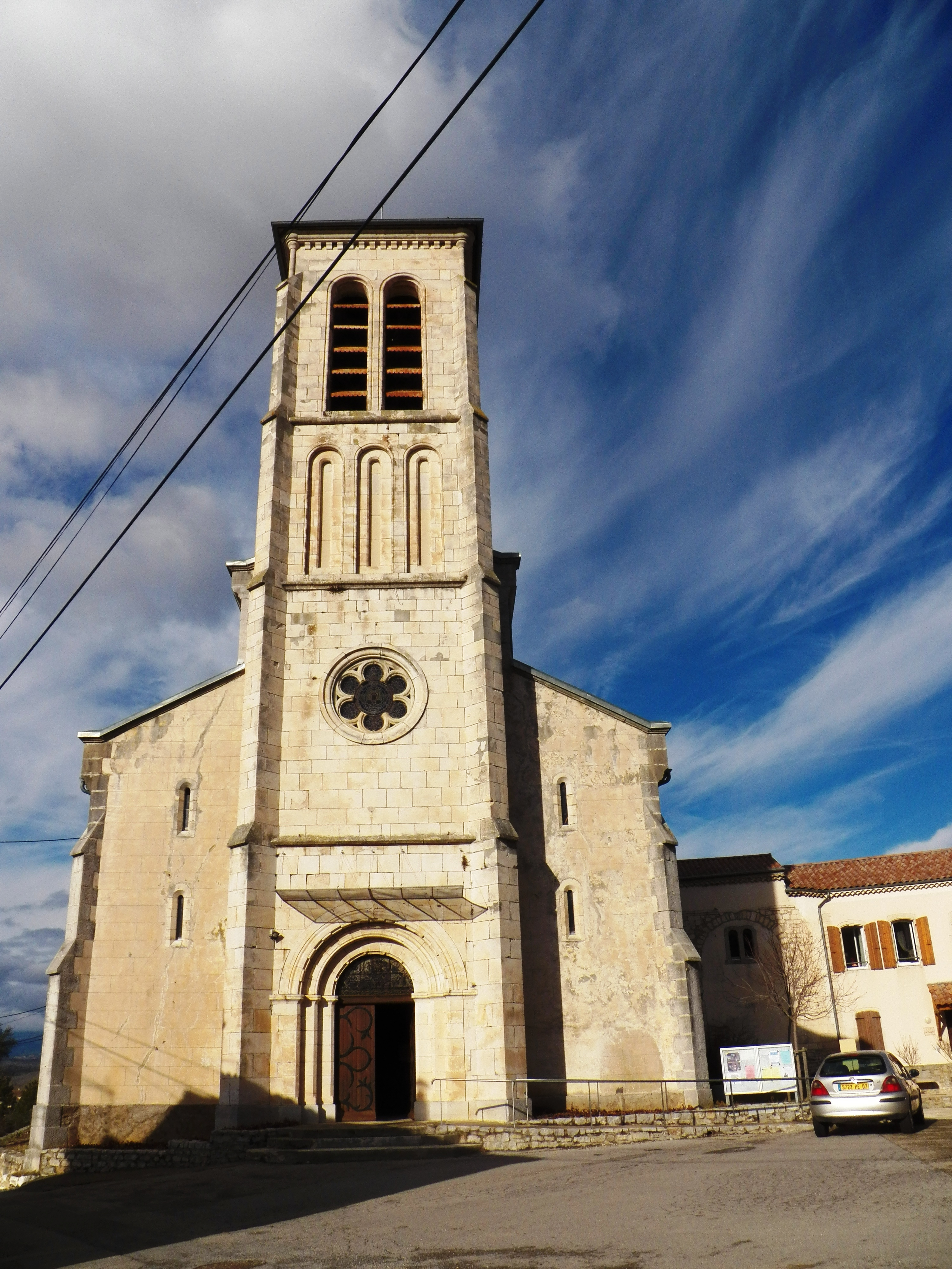 Eglise de Grospierres construite au XIXème siècle sur l'emplaçement d'une église du XIIème.